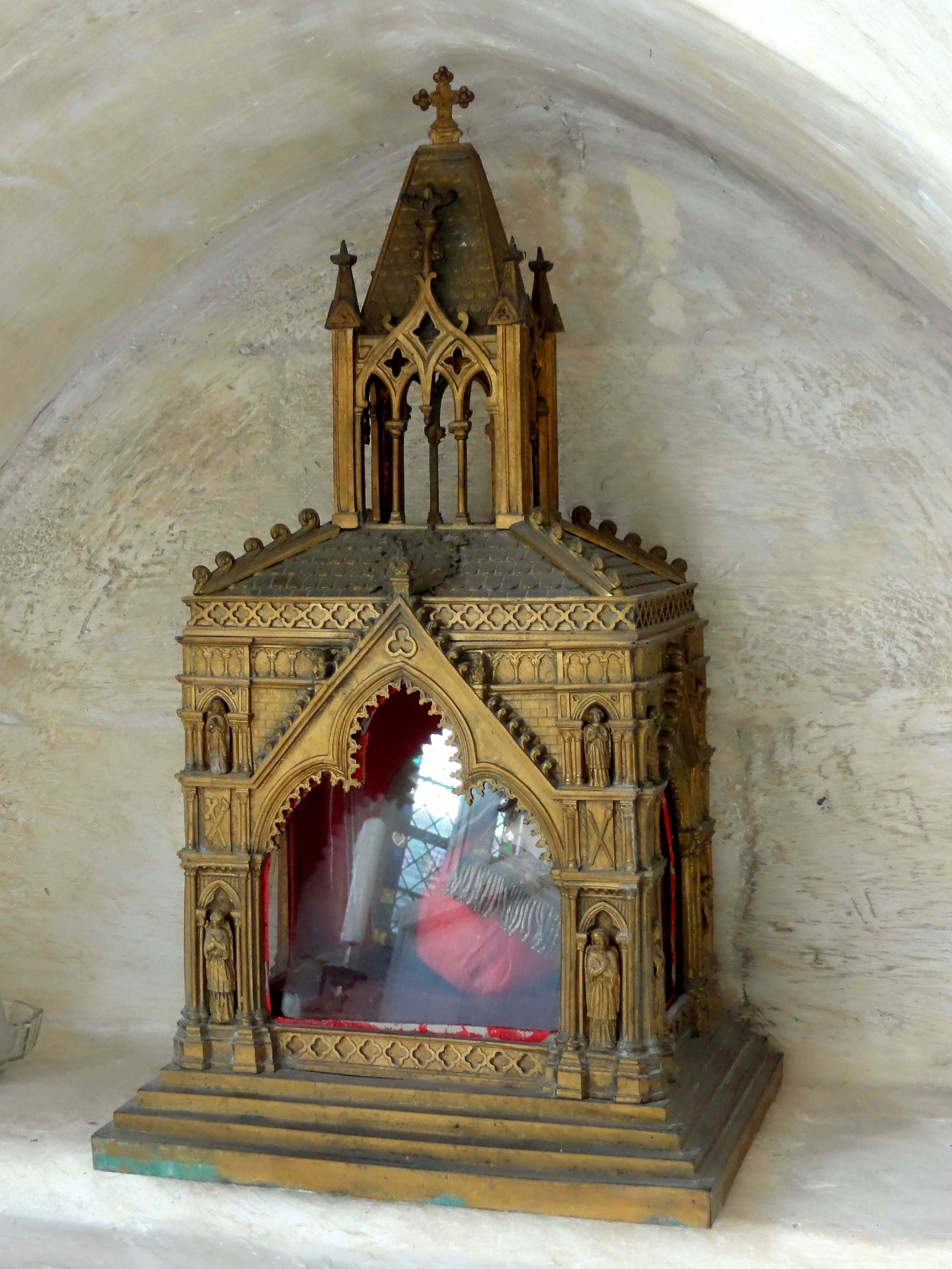 Mobilier de l'église (voir titre).